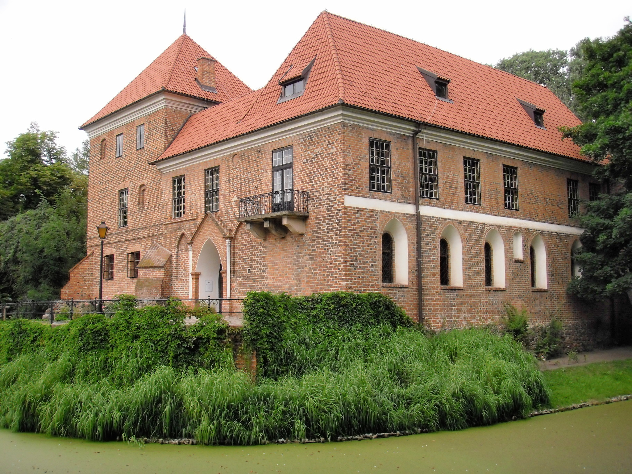 Oporów, zamek, 1434-1449, 1657, 1962-65